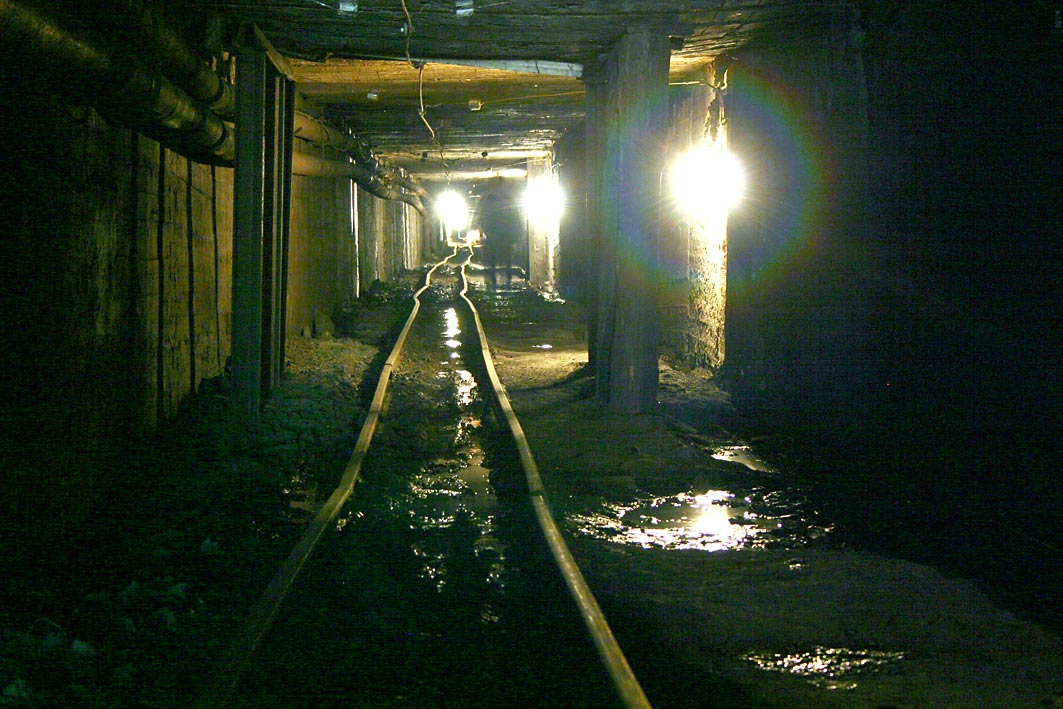 ჭიათურა